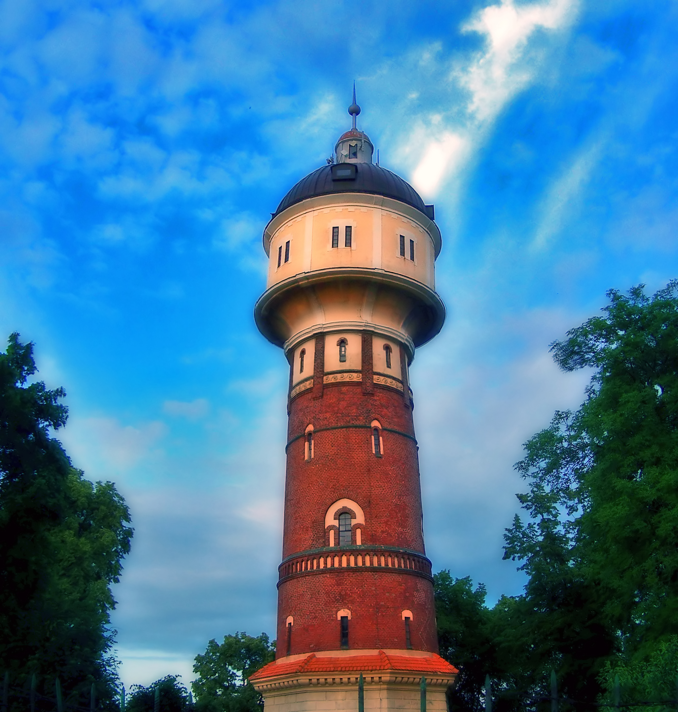 Trzemeszno, ul. Orchowska 18 - wodociągowa wieża ciśnień z lat 1906-1908 (zabytek nr A/406/1-2).